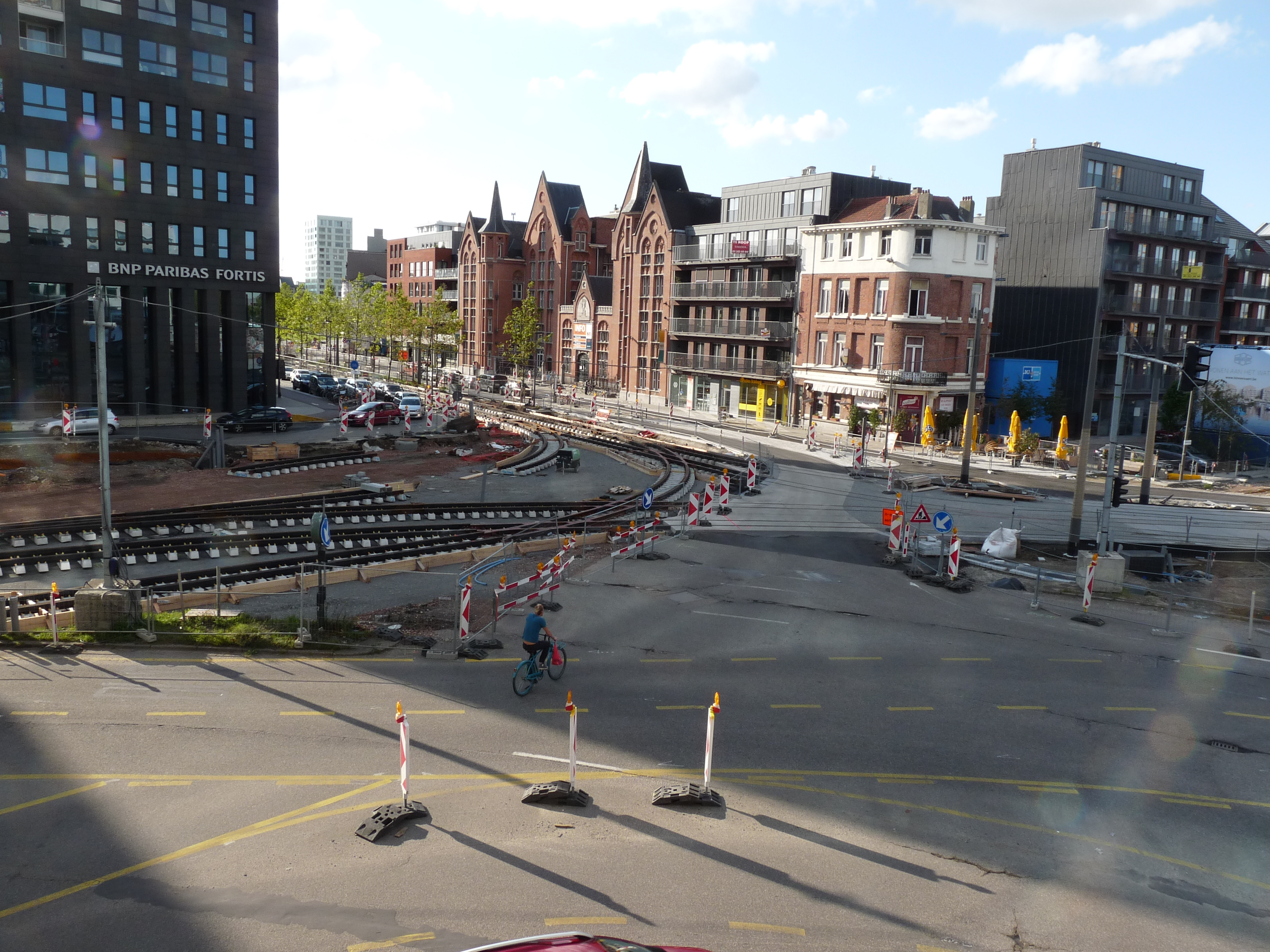 Tramspooraanleg bij de driehoeksaansluiting Londenstraat, Belgiëlei en de Noorderlaan (die verlegd gaat worden), Gezien vanaf de Parkbrug.